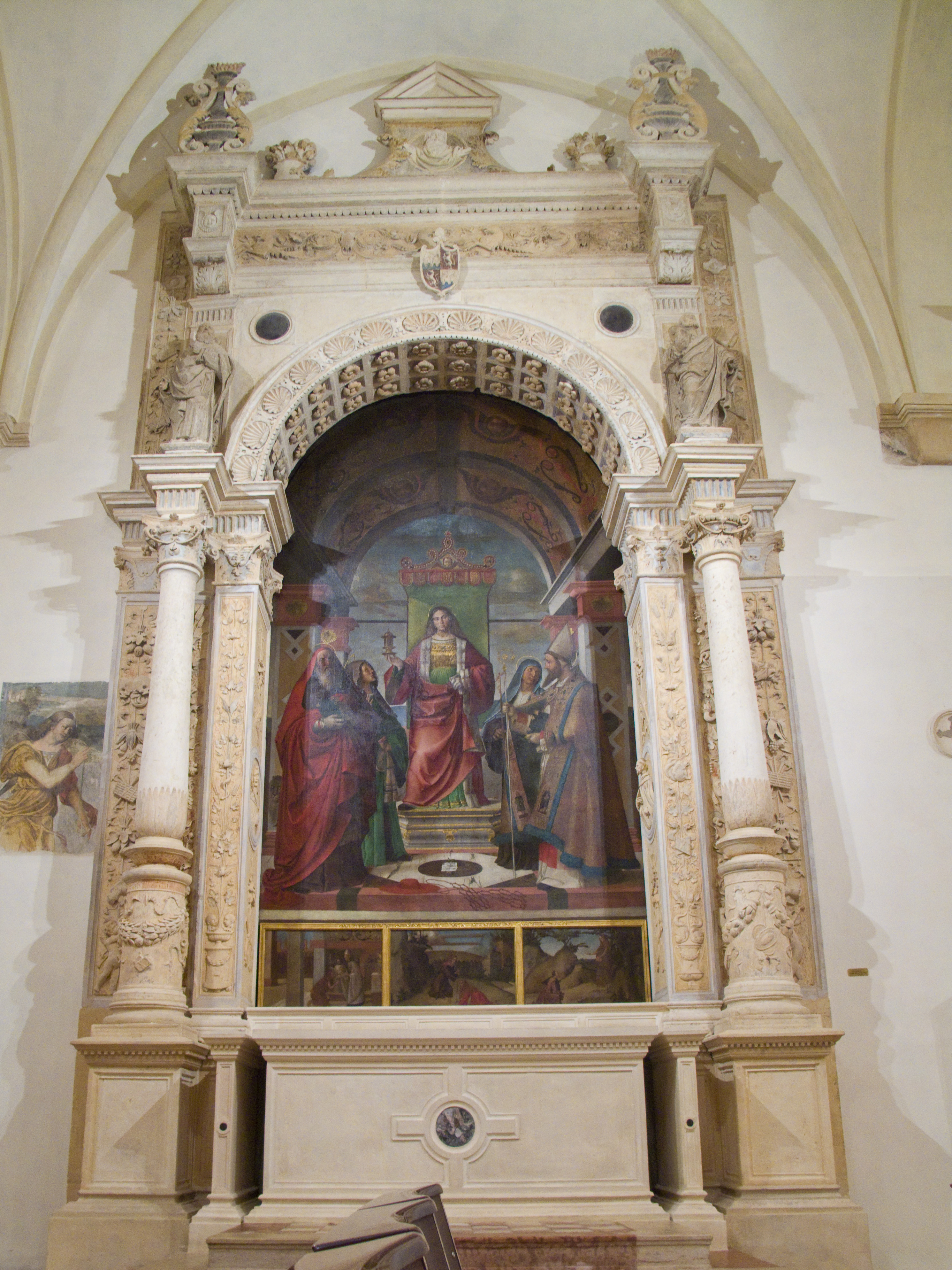 Vicenza - Chiesa di Santa Corona - Altare Pagello